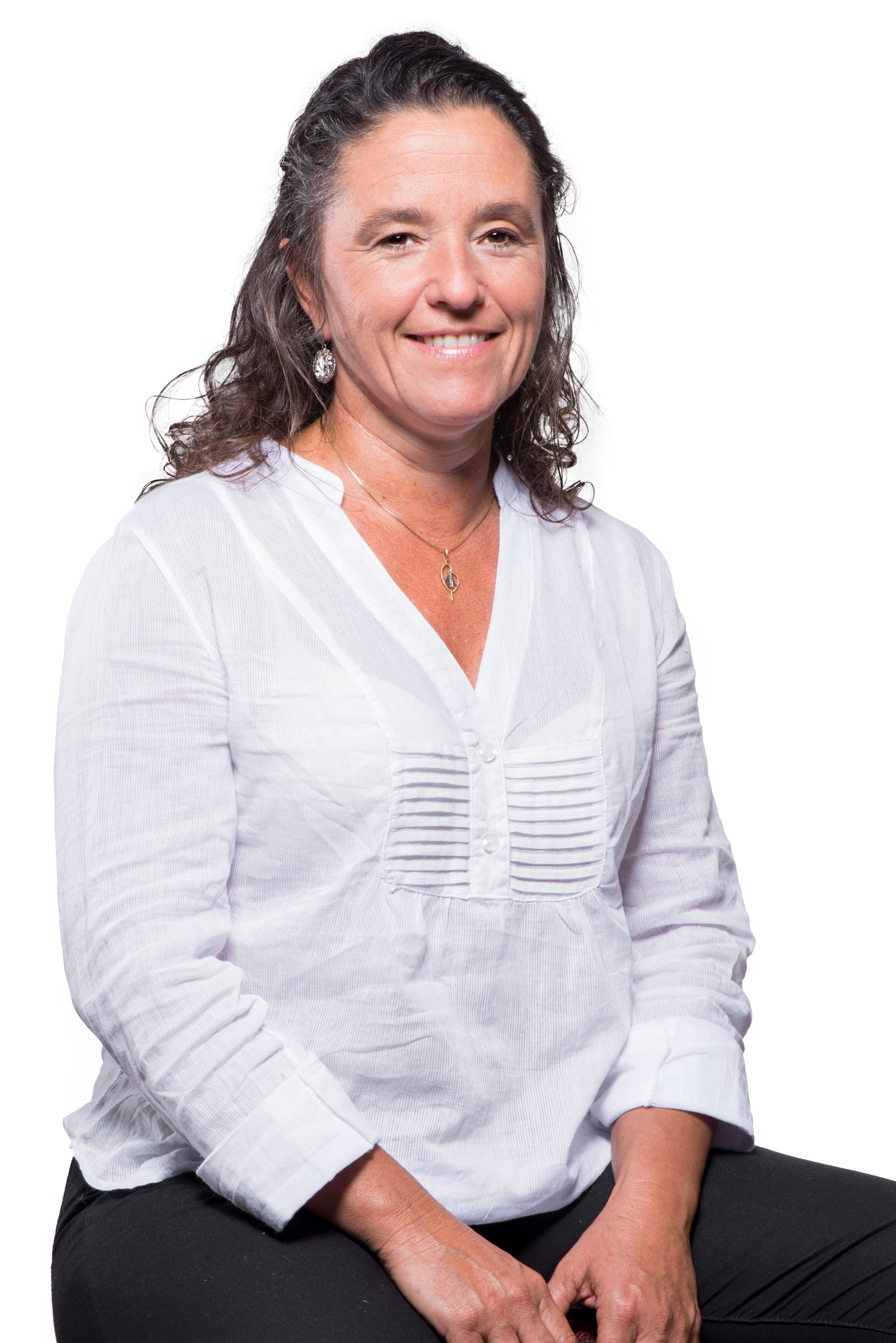 Política uruguaya Patricia Ayala